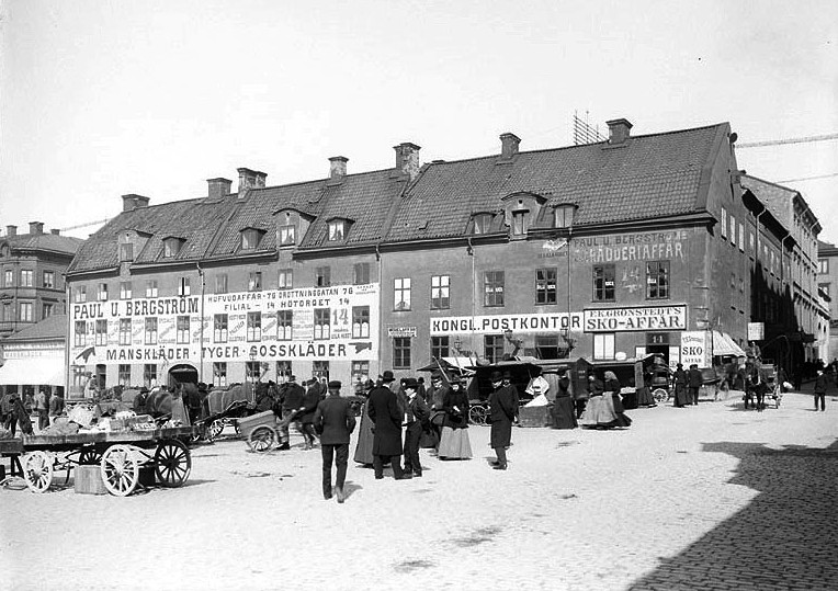 Vy över Hötorget mot öster med Paul U. Bergströms butik (sedermera platsen för Konserthuset).